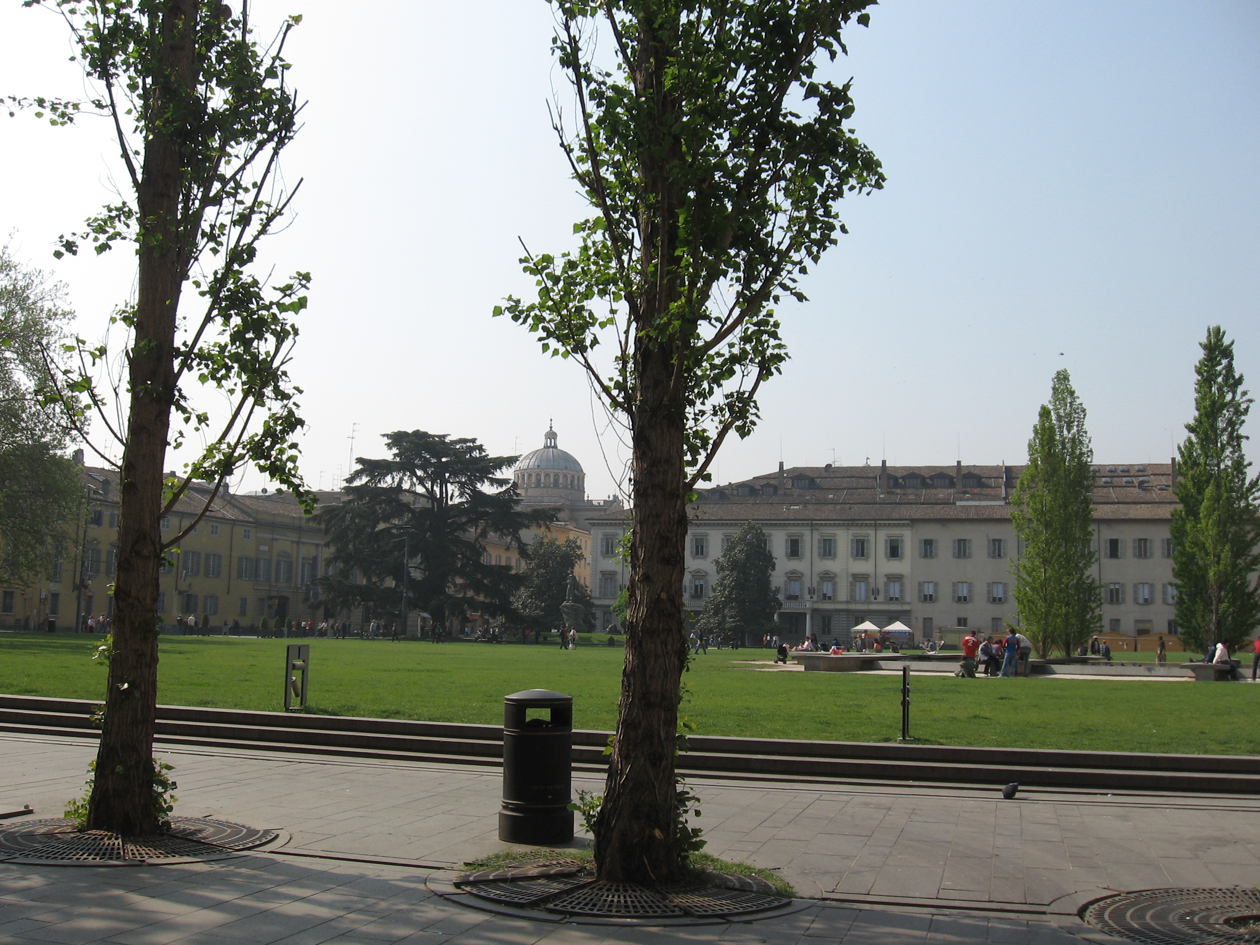 Giardino di piazzale Pilotta di Parma. Sullo sfondo la cupola della Steccata.